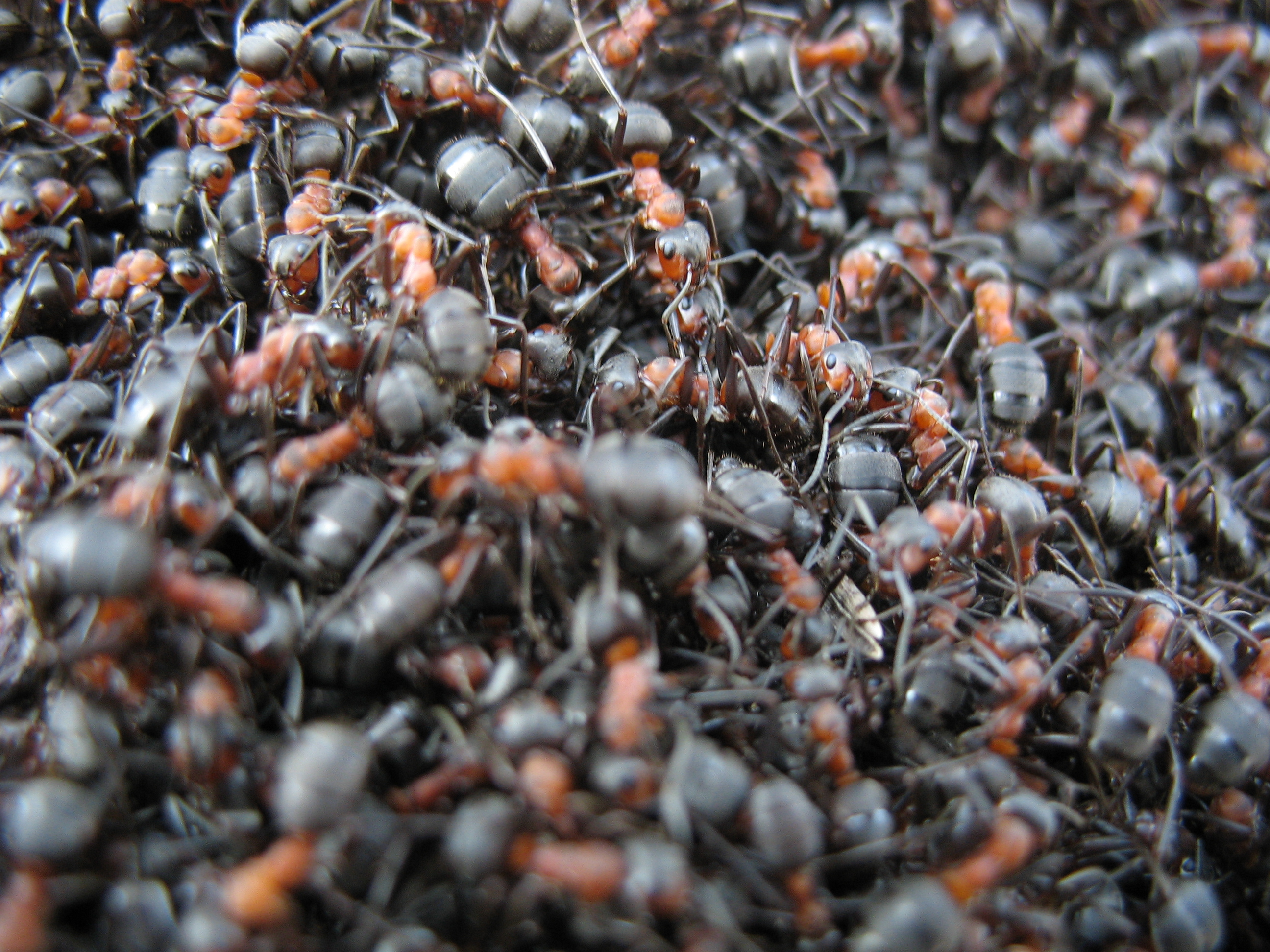 Laanekuklased Kiidjärvel